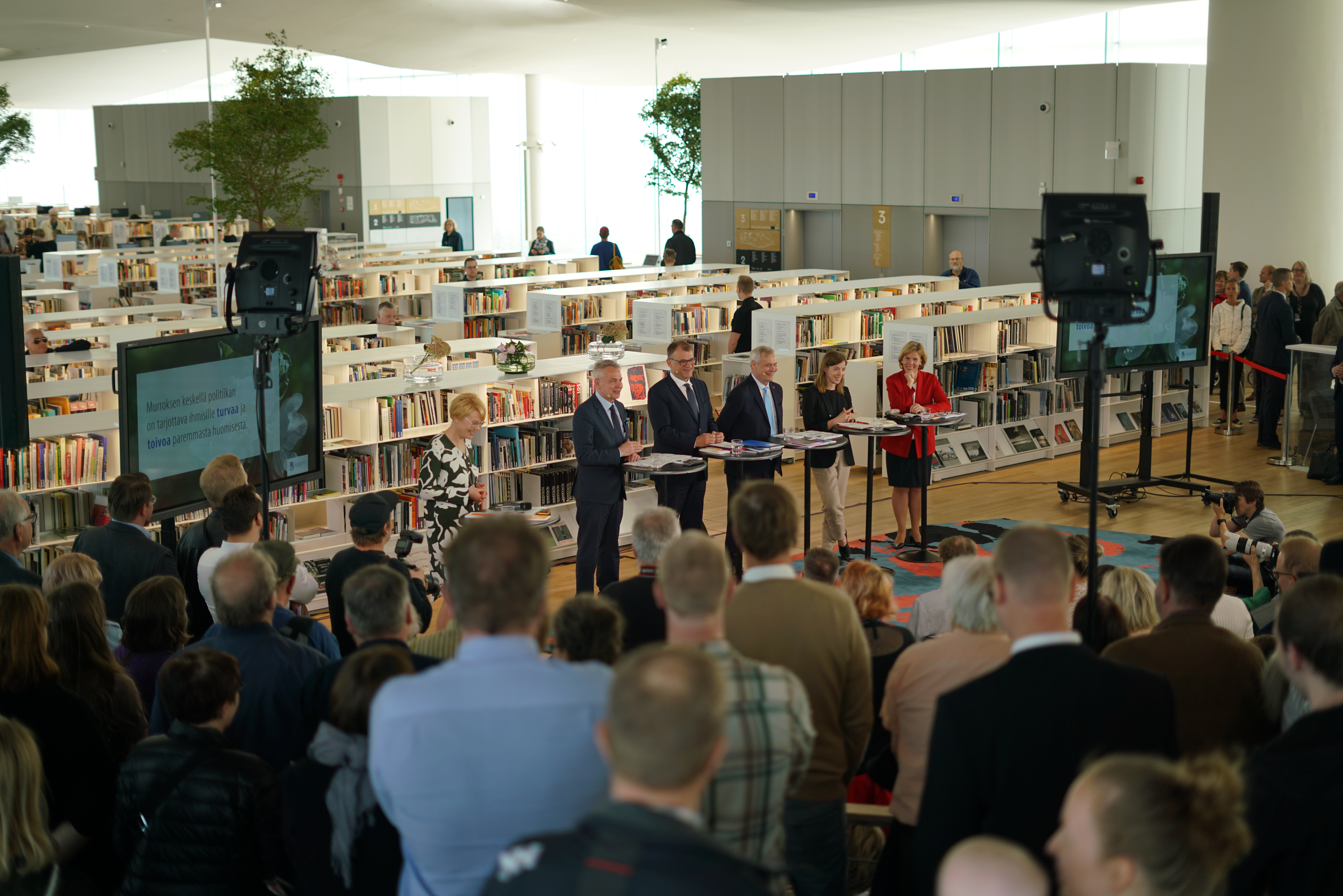 Rinteen hallituksen hallitusohjelman julkistus Oodissa 2019-06-03